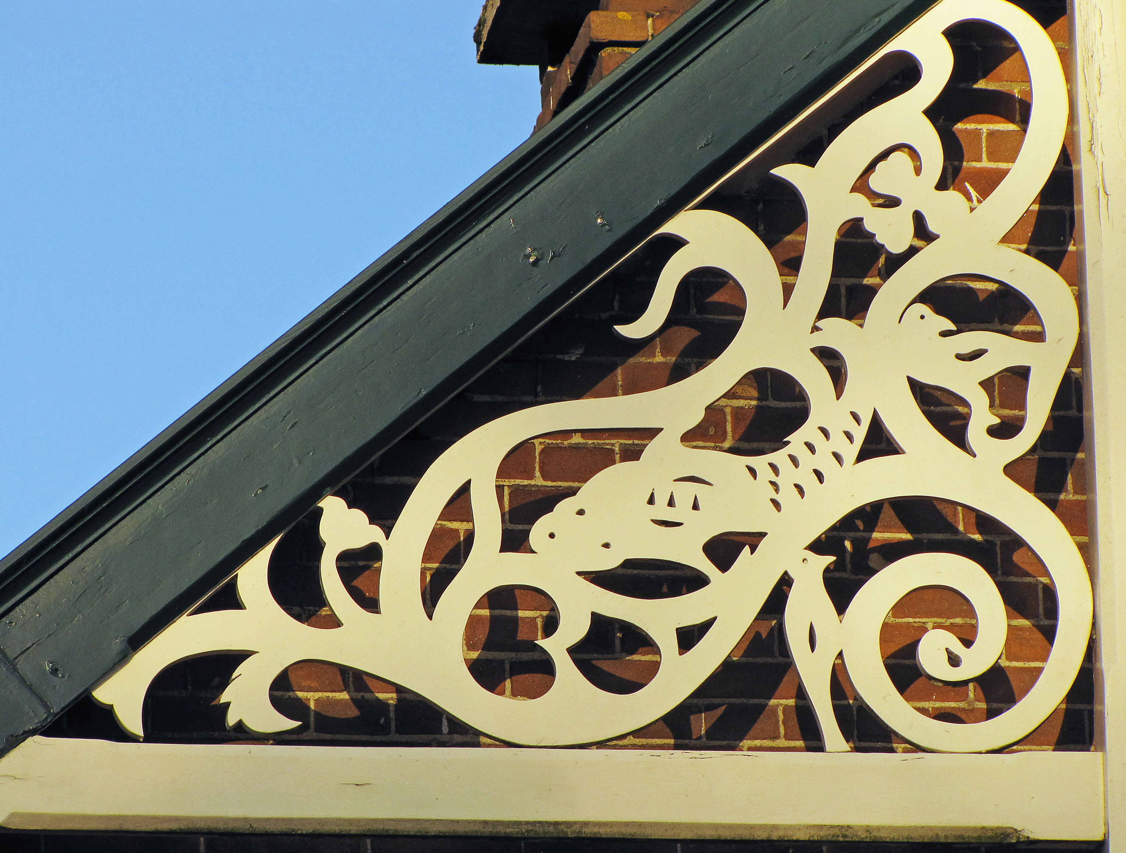 Detail van de geveltop van de langhuisboerderij Lange Brinkweg 11-13. In het filigraanwerk zijn ondermeer een kraai, een specht, een meerval en het blad van een gele plomp te herkennen.